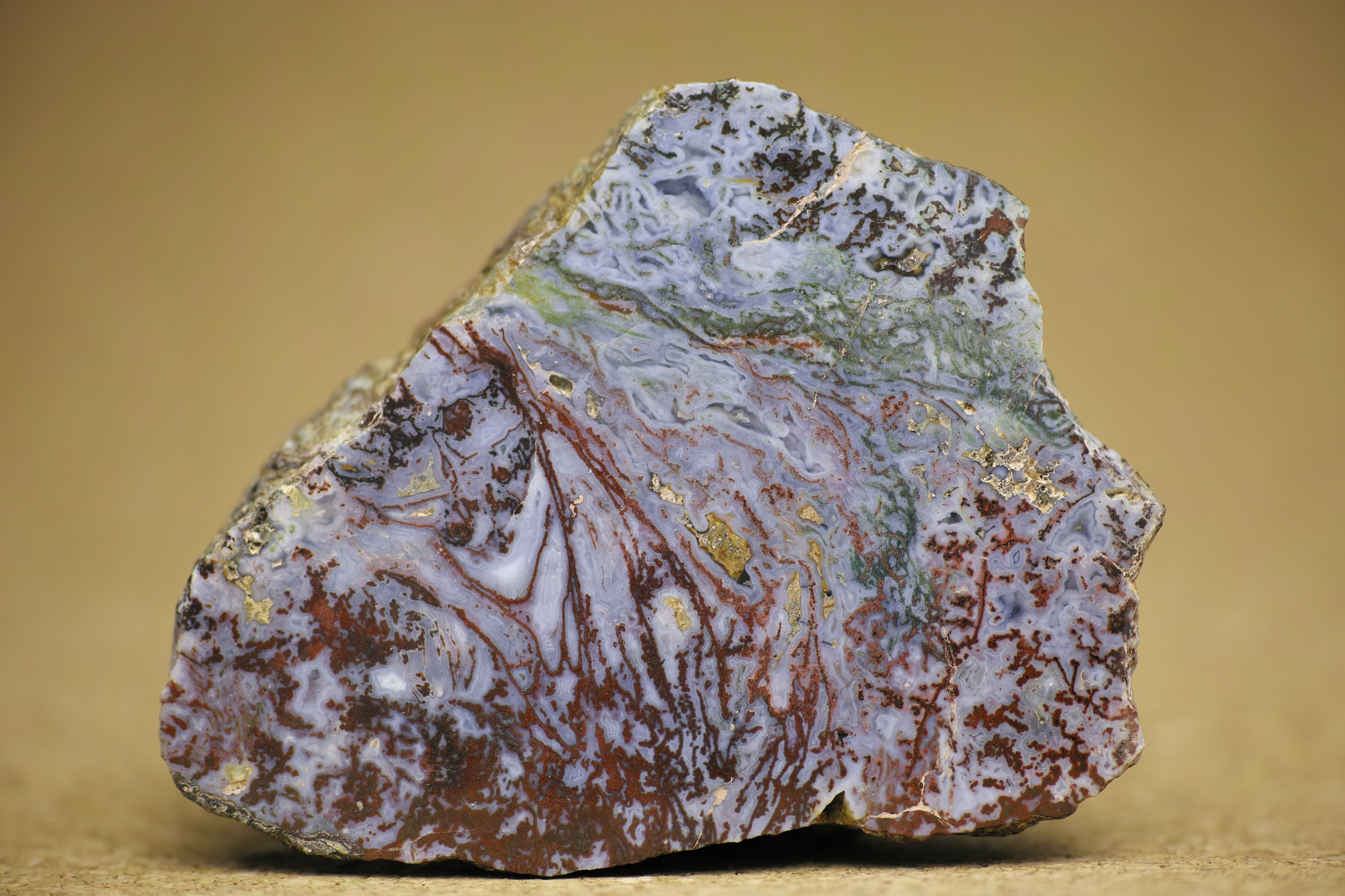 Moss Agate from Gyongyostarjan, Matra Mountains, Hungary